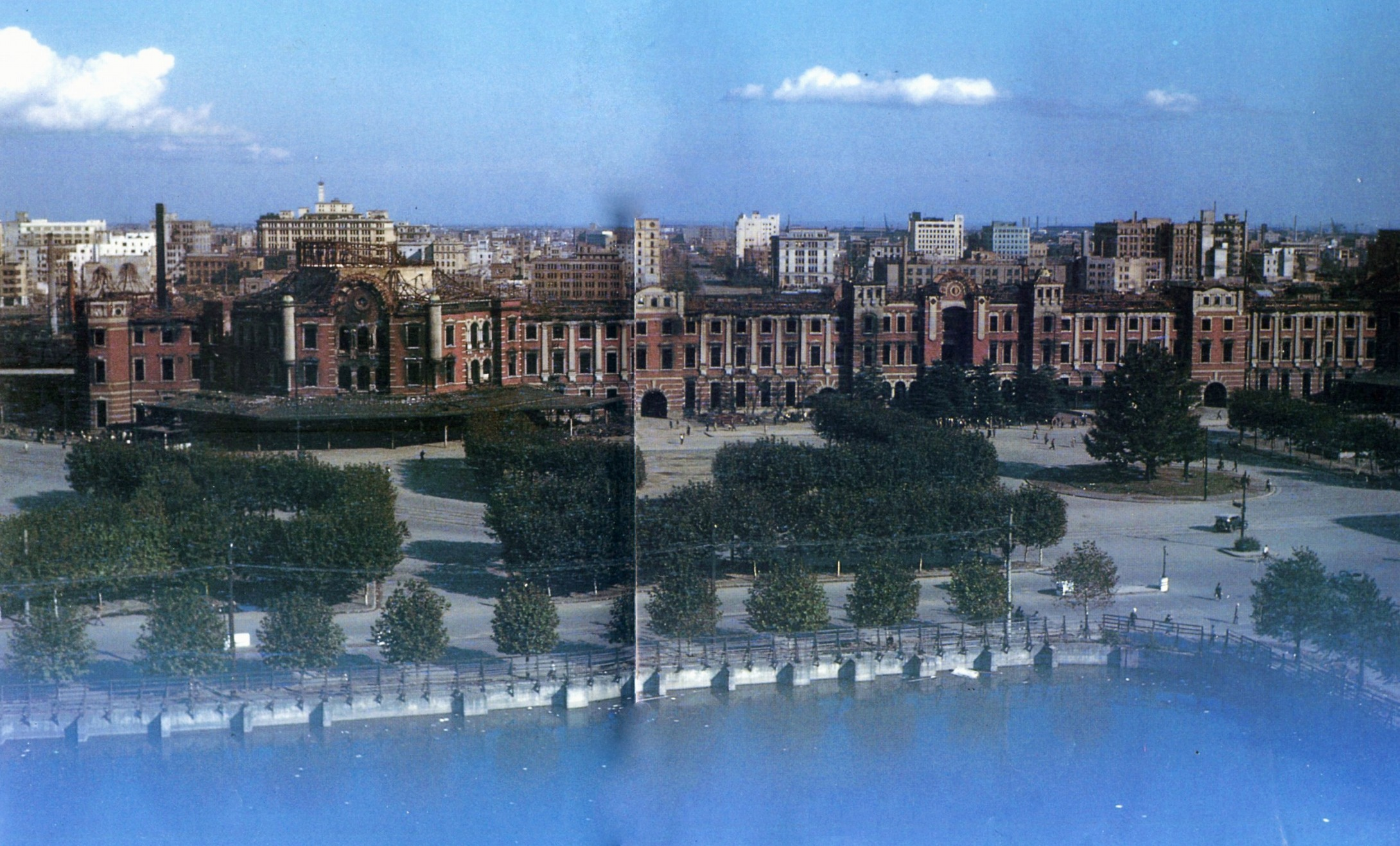 1945年(昭和20年)5月25日の空襲で無残な姿となった東京駅。手前の池は戦時のため中断した新丸ビル建設工事の地下掘削の跡で、防火用水池に利用していた。